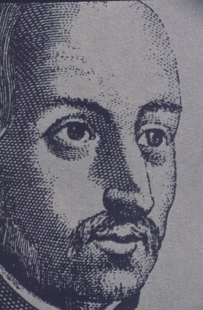 Alfonso Salmeron (1515-1585), spanischer Theologe